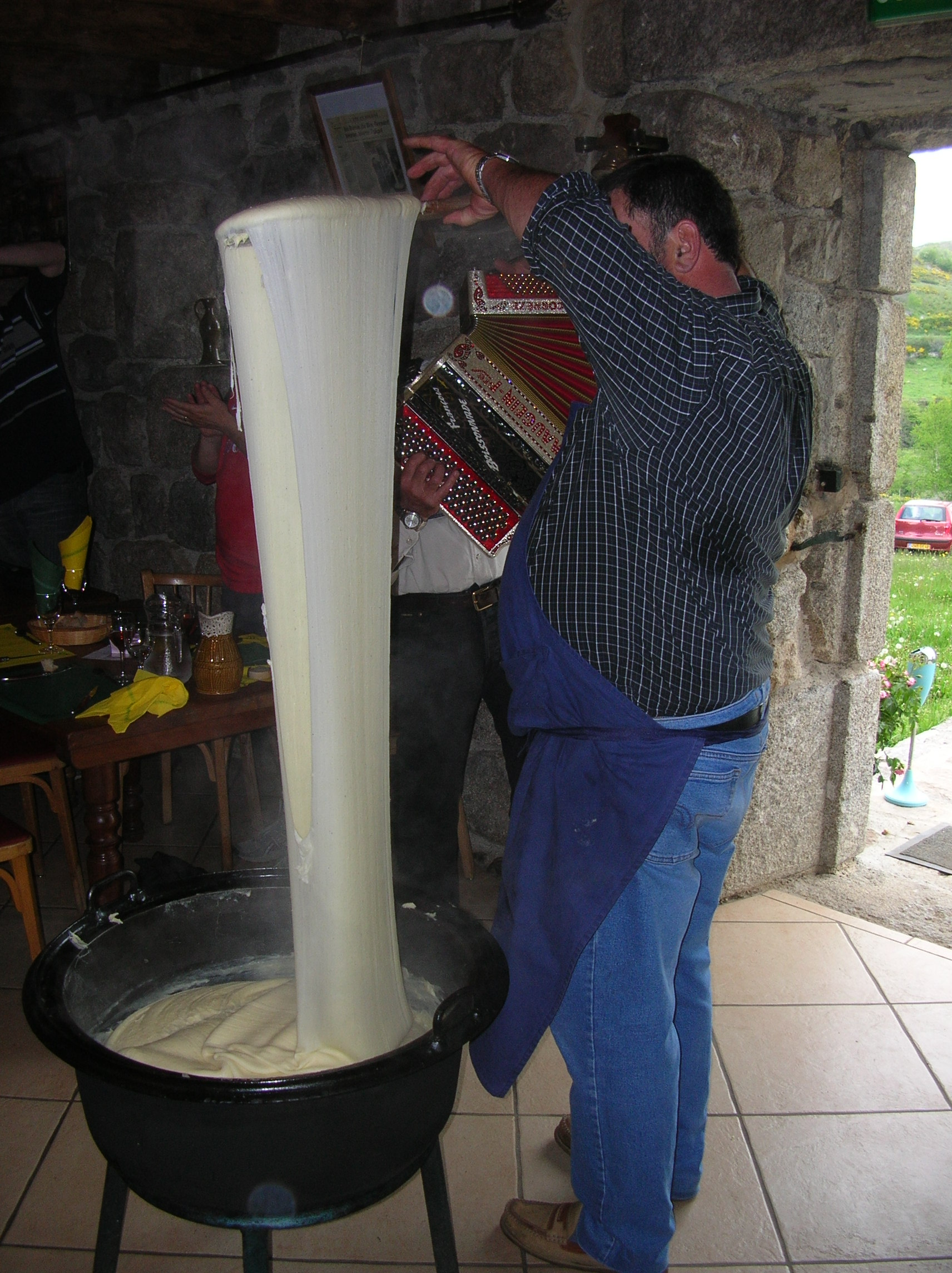 Accordéon et Aligot